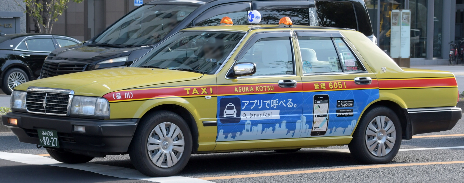 飛鳥交通のY31セドリック。配車アプリのラッピング広告車のため帯に社名が入る。